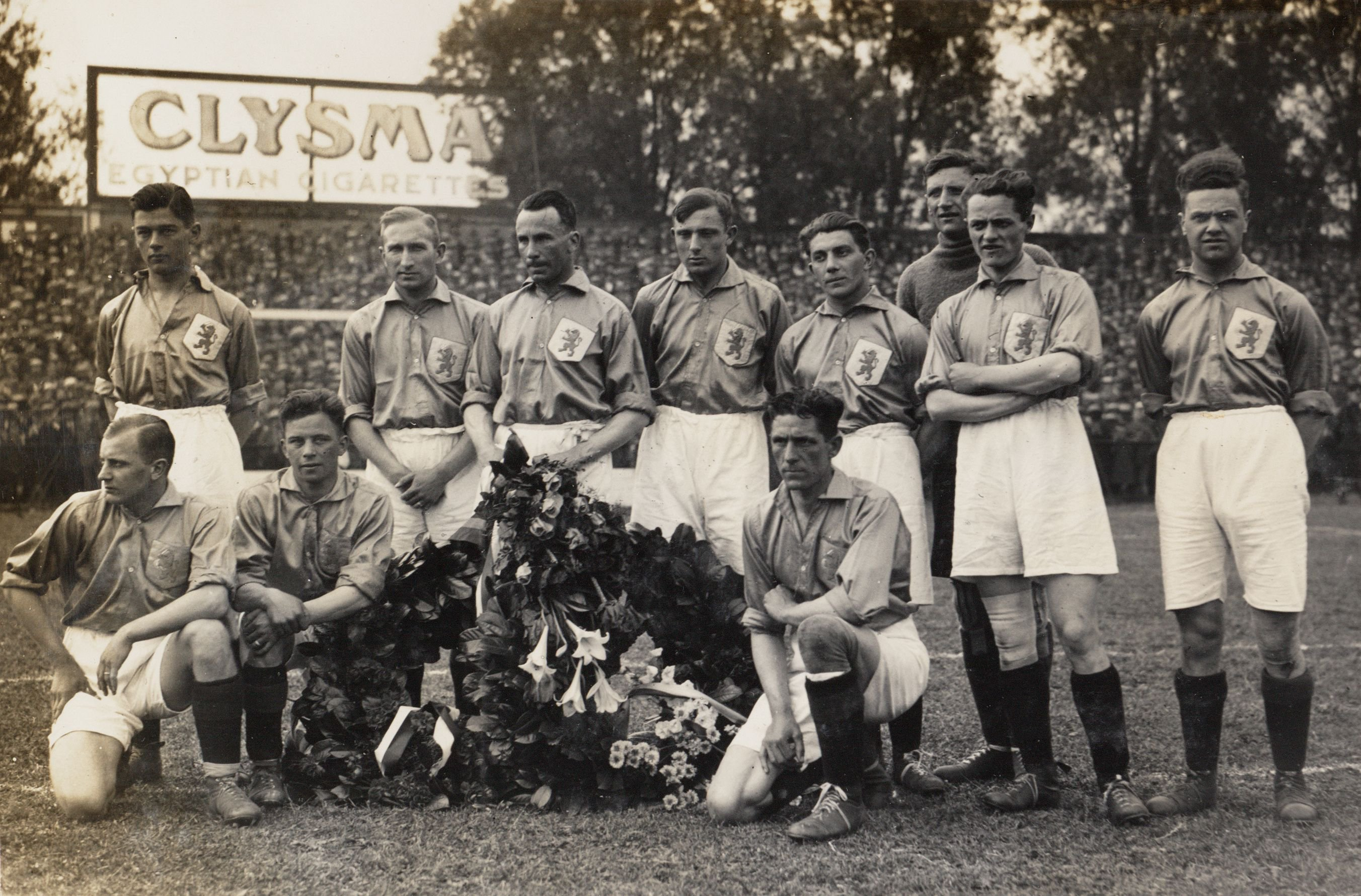 Nederlands elftal voor de interland tegen België. Staand, van links naar rechts: Felix Smeets, Jan Elfring, Harry Dénis, Cor Kools, Puck van Heel, Gejus van der Meulen, Leo Ghering, Dolf van Kol. Geknield: Wim Tap, Jaap Weber en Peer Krom. Nederland - België (3-1), gespeeld op 5 juni 1928 op het Sparta-terrein te Rotterdam voor het troost-toernooi tijdens de Olympische Spelen. Opstelling: Gejus van der Meulen (HFC), Harry Dénis (HBS, aanvoerder), Dolf van Kol (Ajax), Cor Kools (NAC), Puck van Heel (Feyenoord), Peer Krom (RCH), Jan Elfring (Alcmaria Victrix), Felix Smeets (HBS), Wim Tap (ADO), Leo Ghering (LONGA) en Jaap Weber (Sparta). Nederland - België (3-1), gespeeld op 5 juni 1928 op het Sparta-terrein te Rotterdam voor het troost-toernooi tijdens de Olympische Spelen.